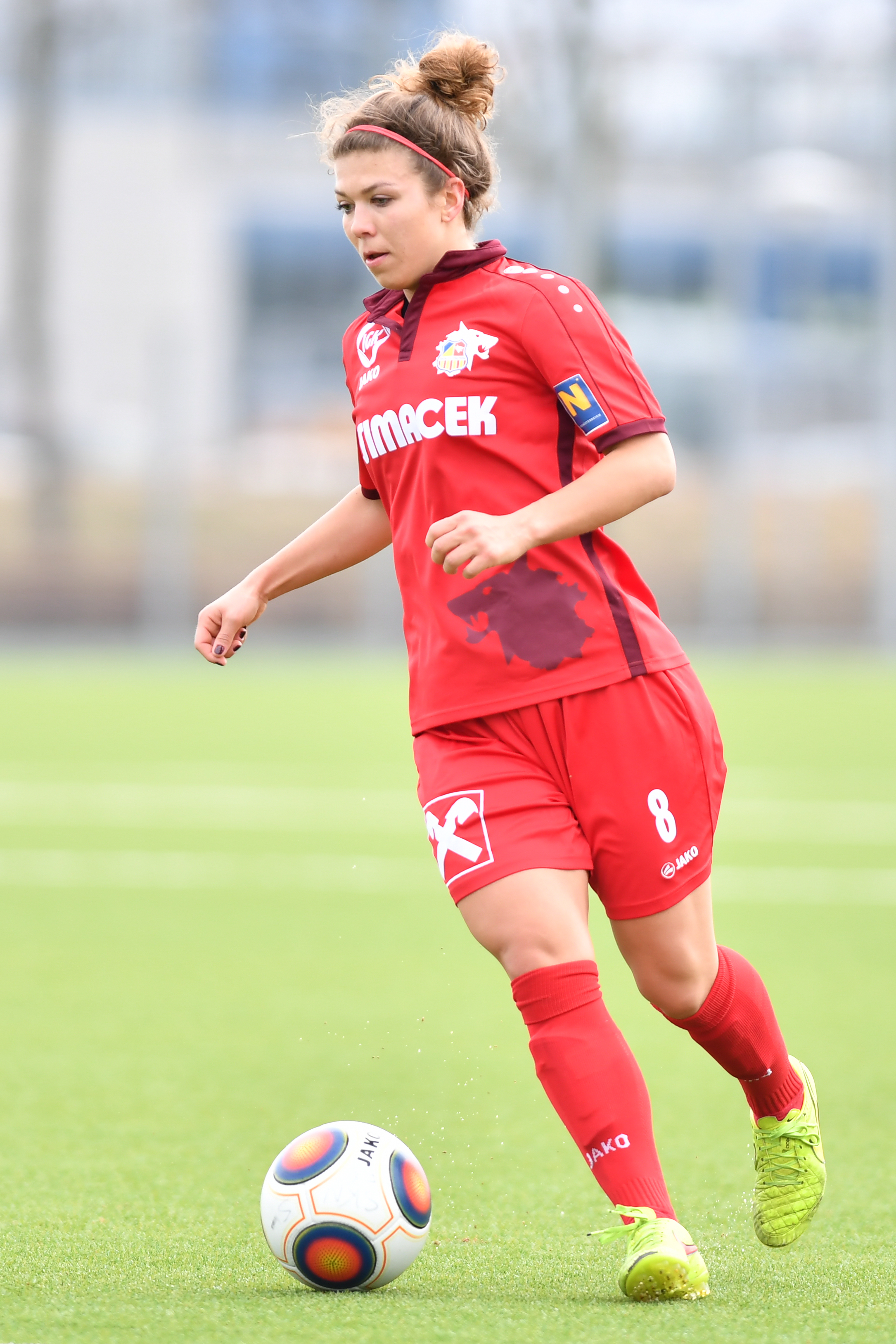 St. Pölten, Österreich, 19.3.2017, Sport, Fussball, OEFB Frauen Bundesliga - SKN St. Poelten vs SK Sturm Graz. Bild zeigt Nadine Prohaska (SKN).